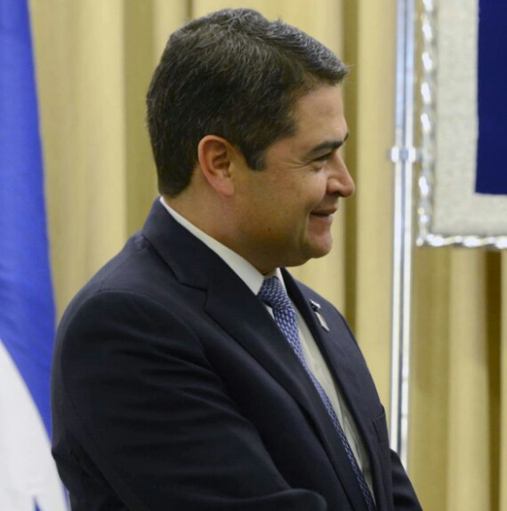 Juan Orlando Hernández